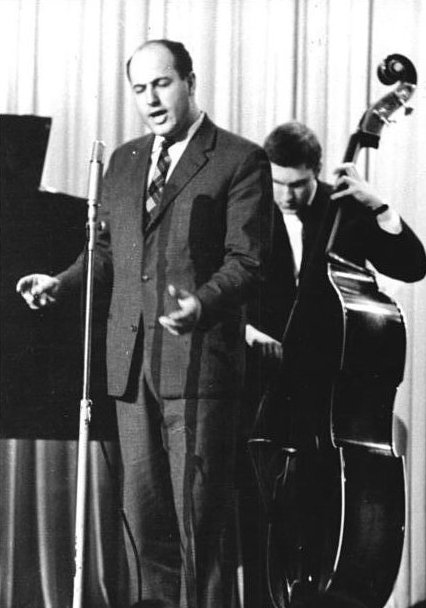 Zentralbild-Leske Sd-At. 20.2.1962 "Jazz-Optimisten - Jamboree" Die 3. Folge der "jazz-Optimisten-jamboree" mit Marianne Wünscher, Manfred Krug und den Jazz-Optimisten-Berlin fand am 18.2.62 im Marmorsaal im Zentralen Haus der Deutsch-Sowjetischen-Freundschaft begeisterte Zuhörer. UBz.: Schauspieler Manfred Krug, allen bekannt durch seinen Film "Auf der Sonnenseite", bei seinem Vortrag."